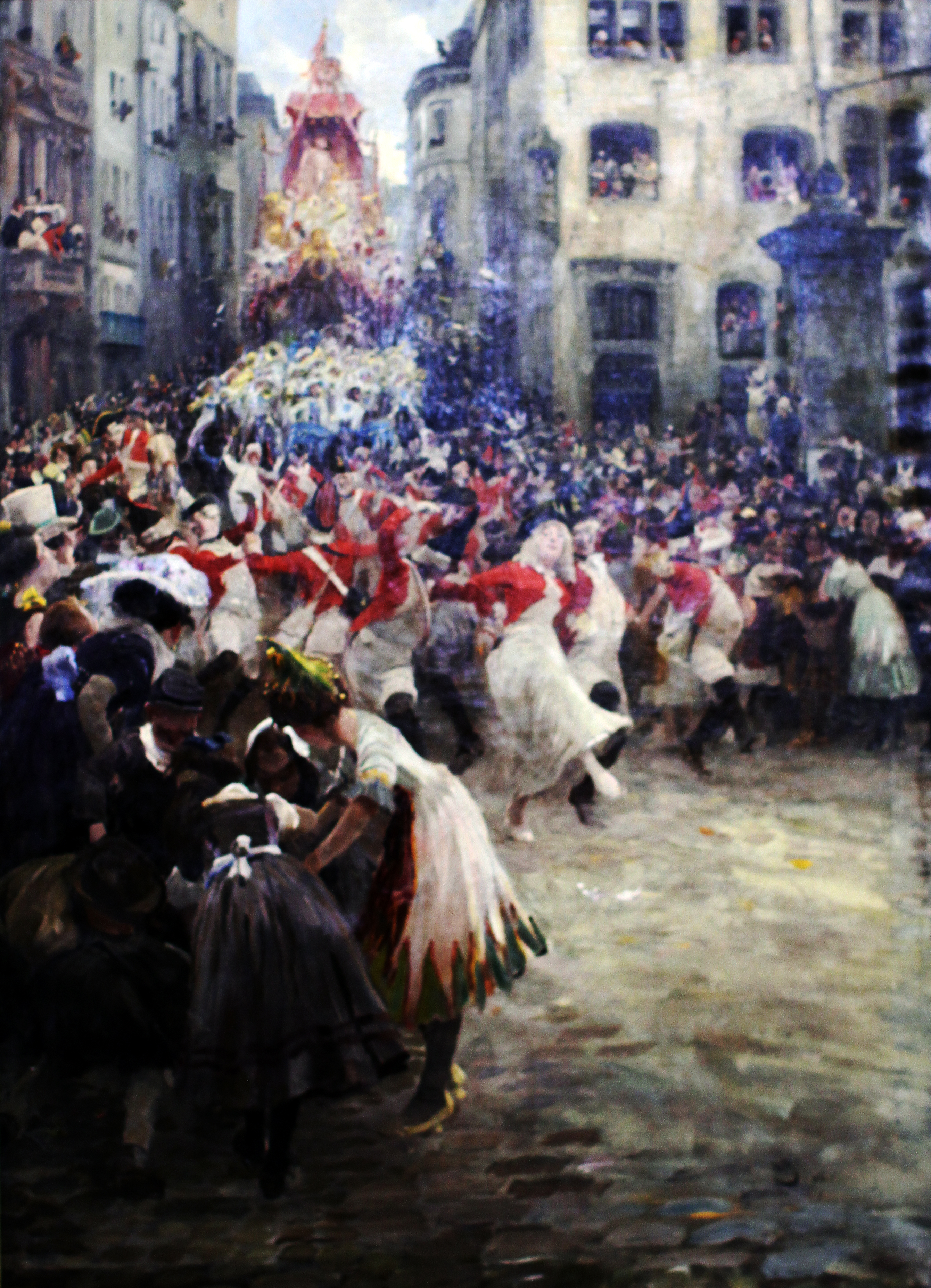 Wilhelm Schreuer, Kölner Rosenmontagszug auf dem Marsplatz. Fotoausschnitt eines Gemäldes (Öl auf Leinwand) in der ständigen Ausstellung des Kölner Stadtmuseums.